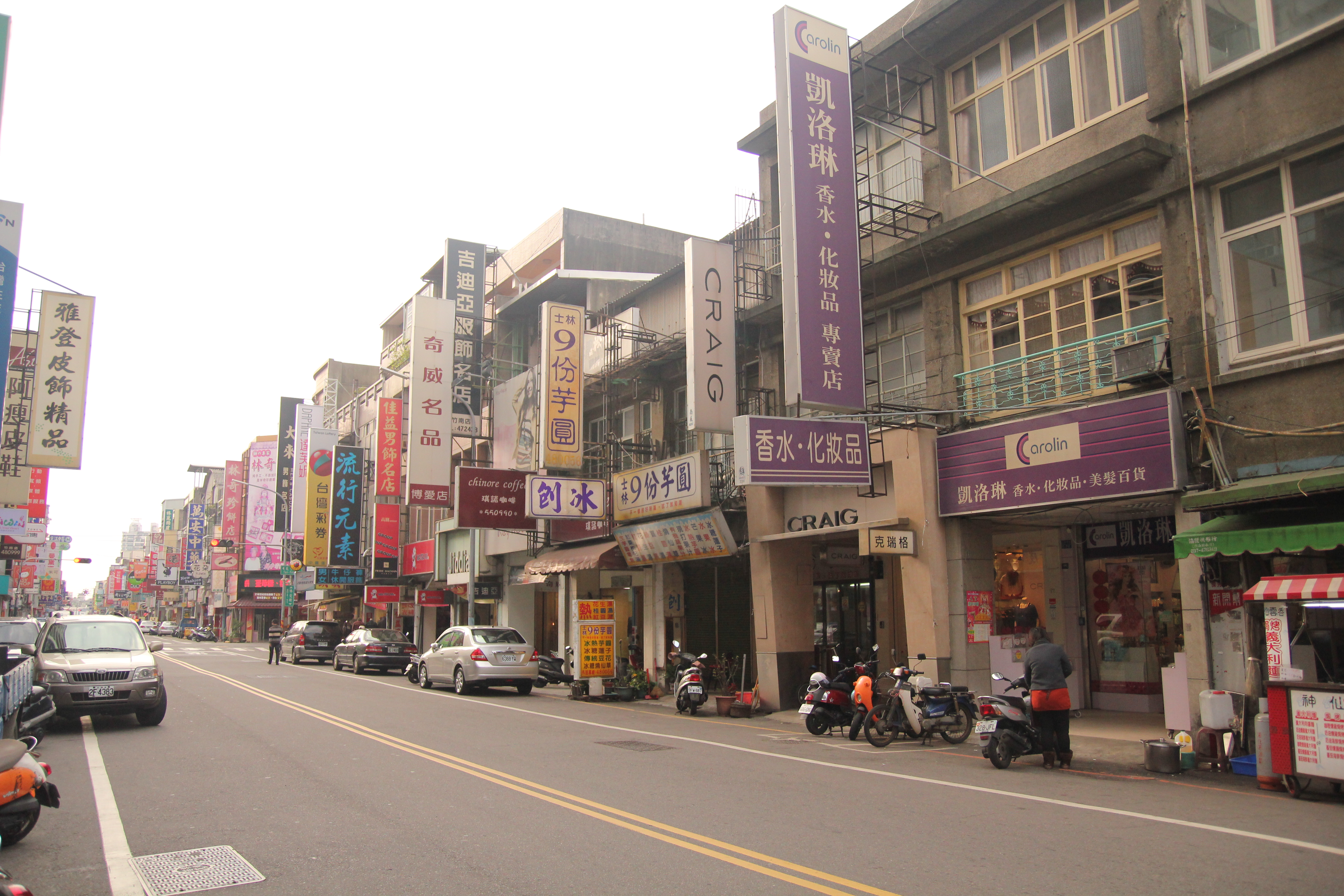 苗栗縣竹南鎮博愛街市區1